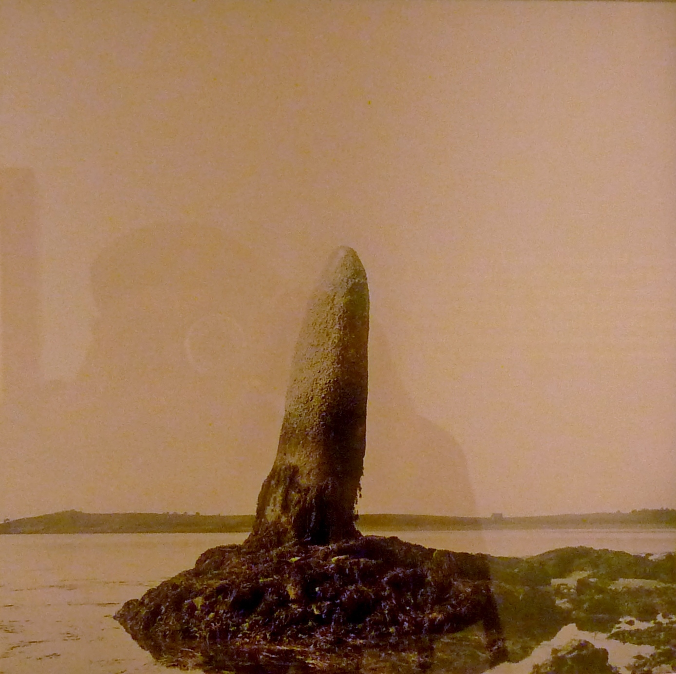 Le menhir oblique (désaxé) d'Er-Lannic (photographie prise en 1929 par Zacharie Le Rouzic). Ce menhir mesure près de 7 mètres de haut et pèse environ 20 tonnes. Il est en orthogneiss, une roche importée d'une distance de plusieurs kilomètres